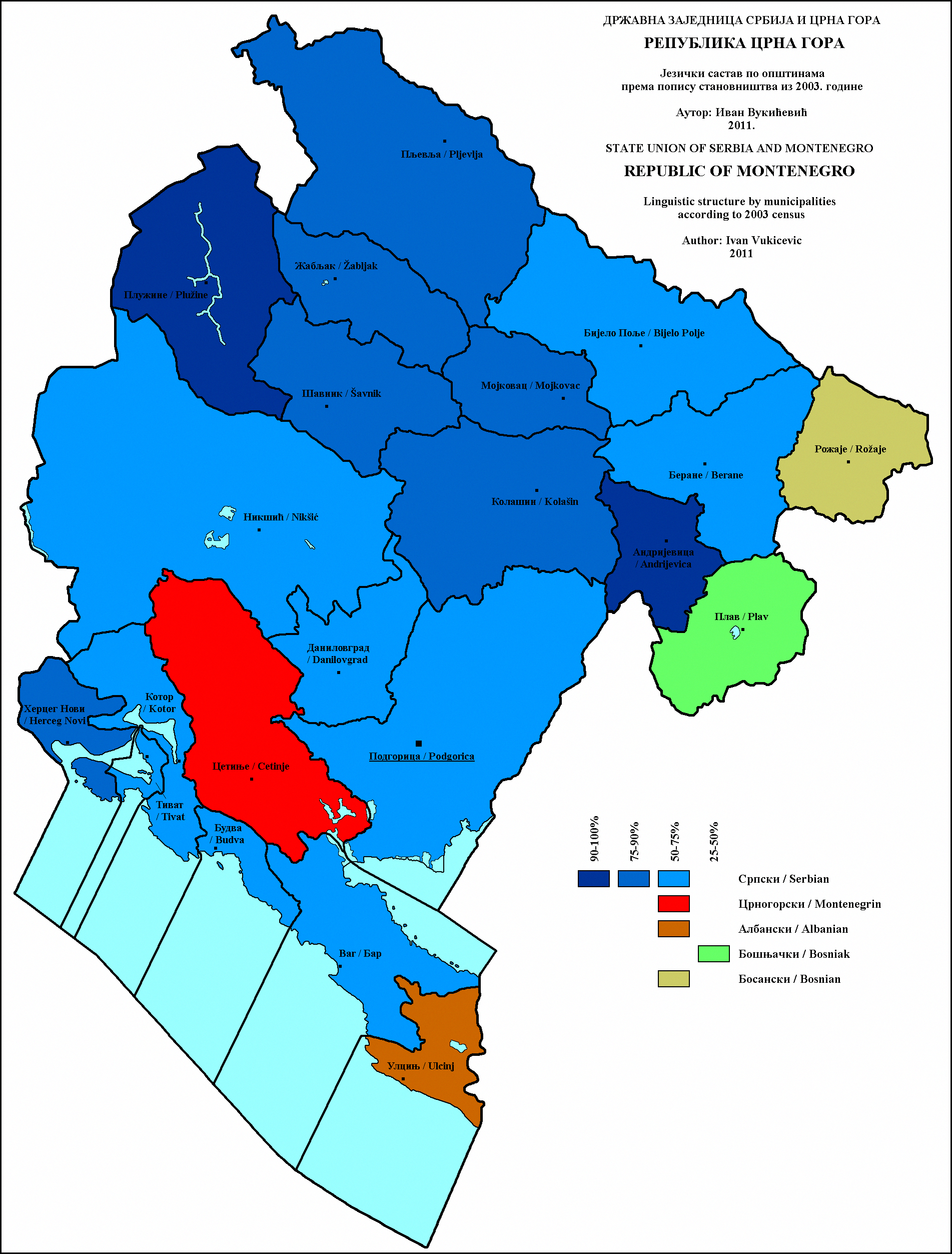 Језички састав Црне Горе по општинама 2003. године. Аутор: Иван Вукићевић